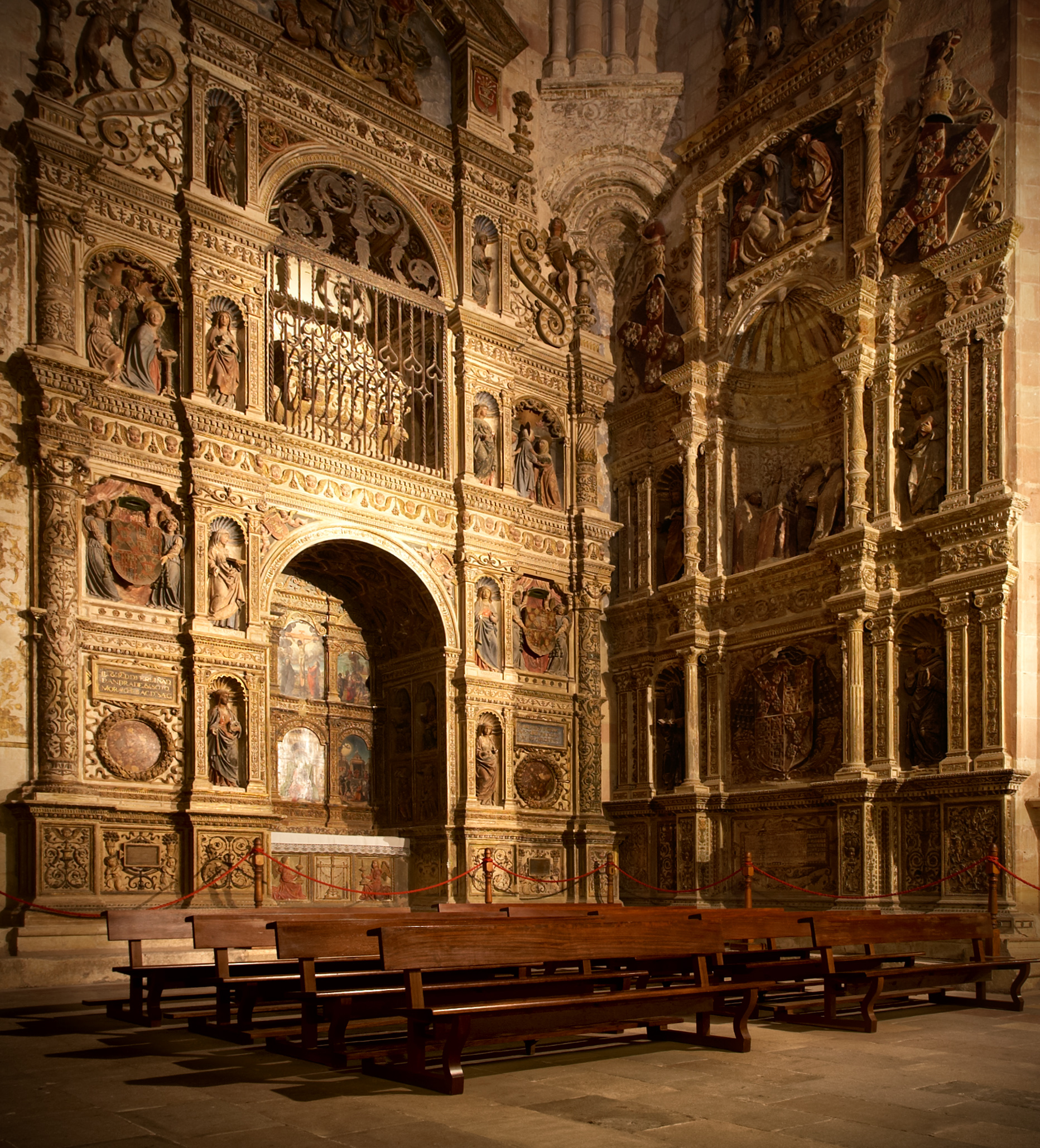 Interior de la Catedral de Sigüenza, Guadalajara, España.